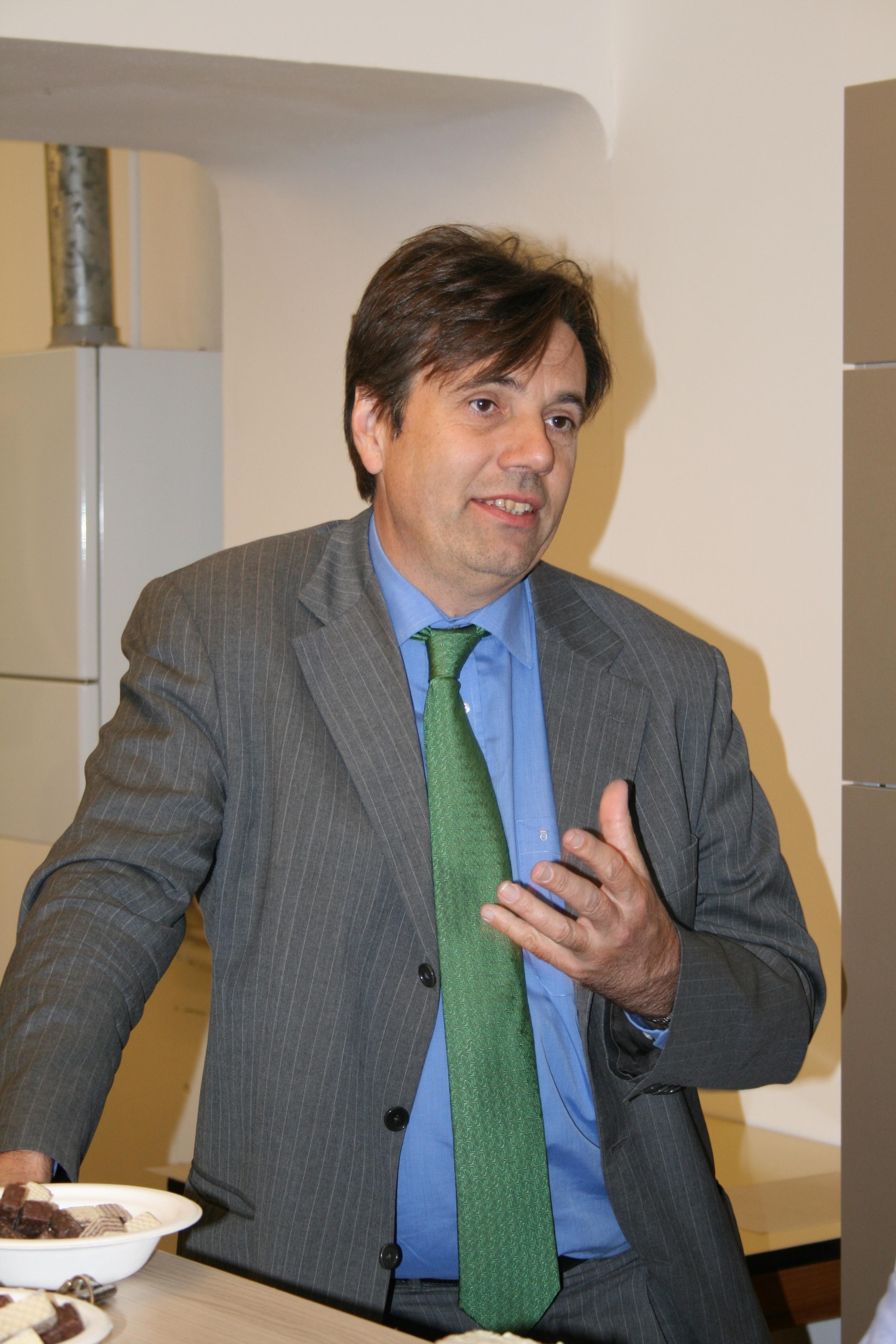 Der ehemalige Klubobmann der ÖVP-Wien Matthias Tschirf